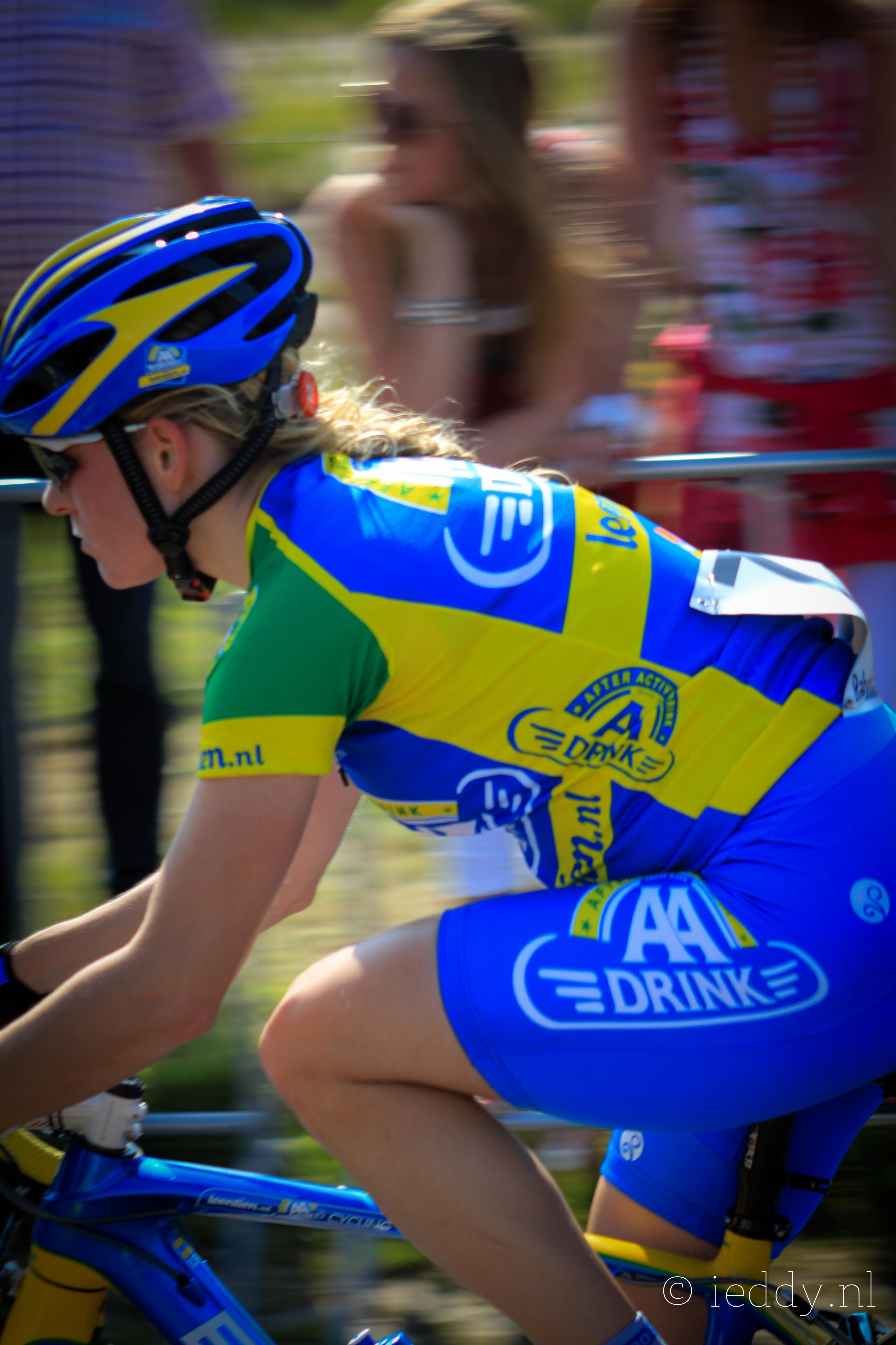 Daphny van den Brand Draai van de Kaai 2011